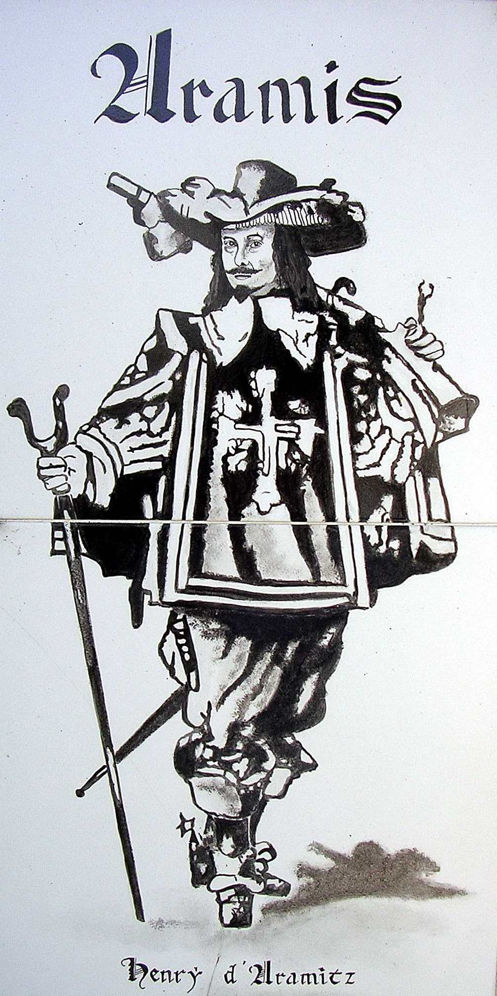 Aramis mousquetaire. Illustration du porche de l'ancienne abbaye laïque d'Aramits, dans le département français des Pyrénées-Atlantiques